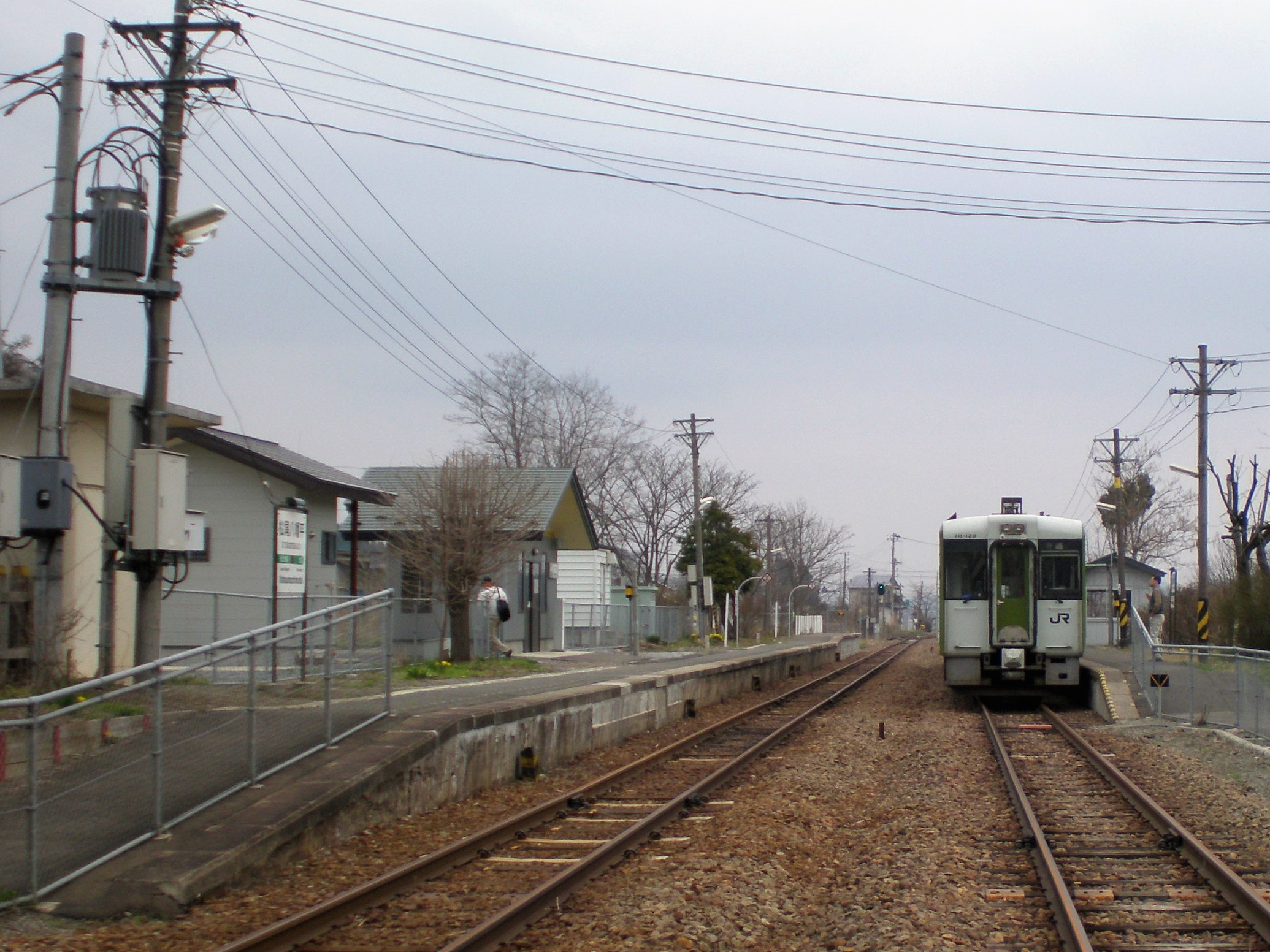 花輪線松尾八幡平駅に停車中のキハ110系（2007年5月撮影）